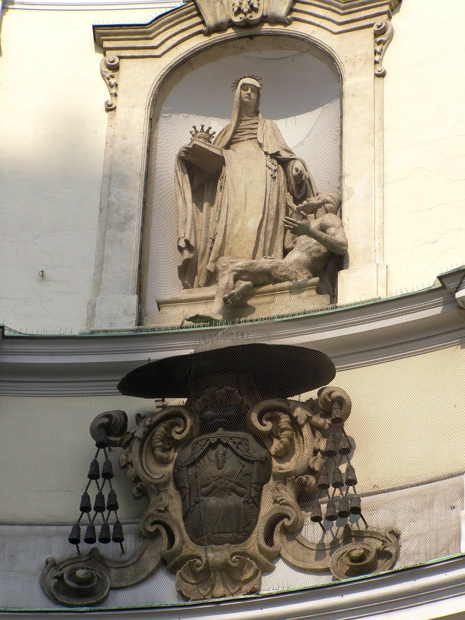 Súsošie sv. Alžbety so žobrákom v nike priečelia. Pod ním reliéfny erb arcibiskupa Imricha Esterházyho